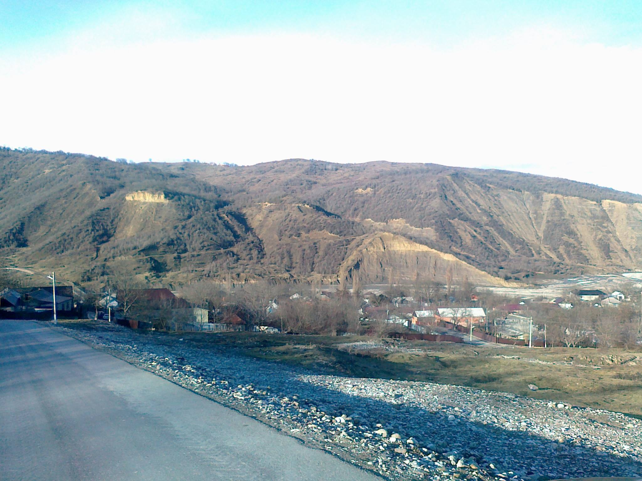 Нохчийн: Сесана